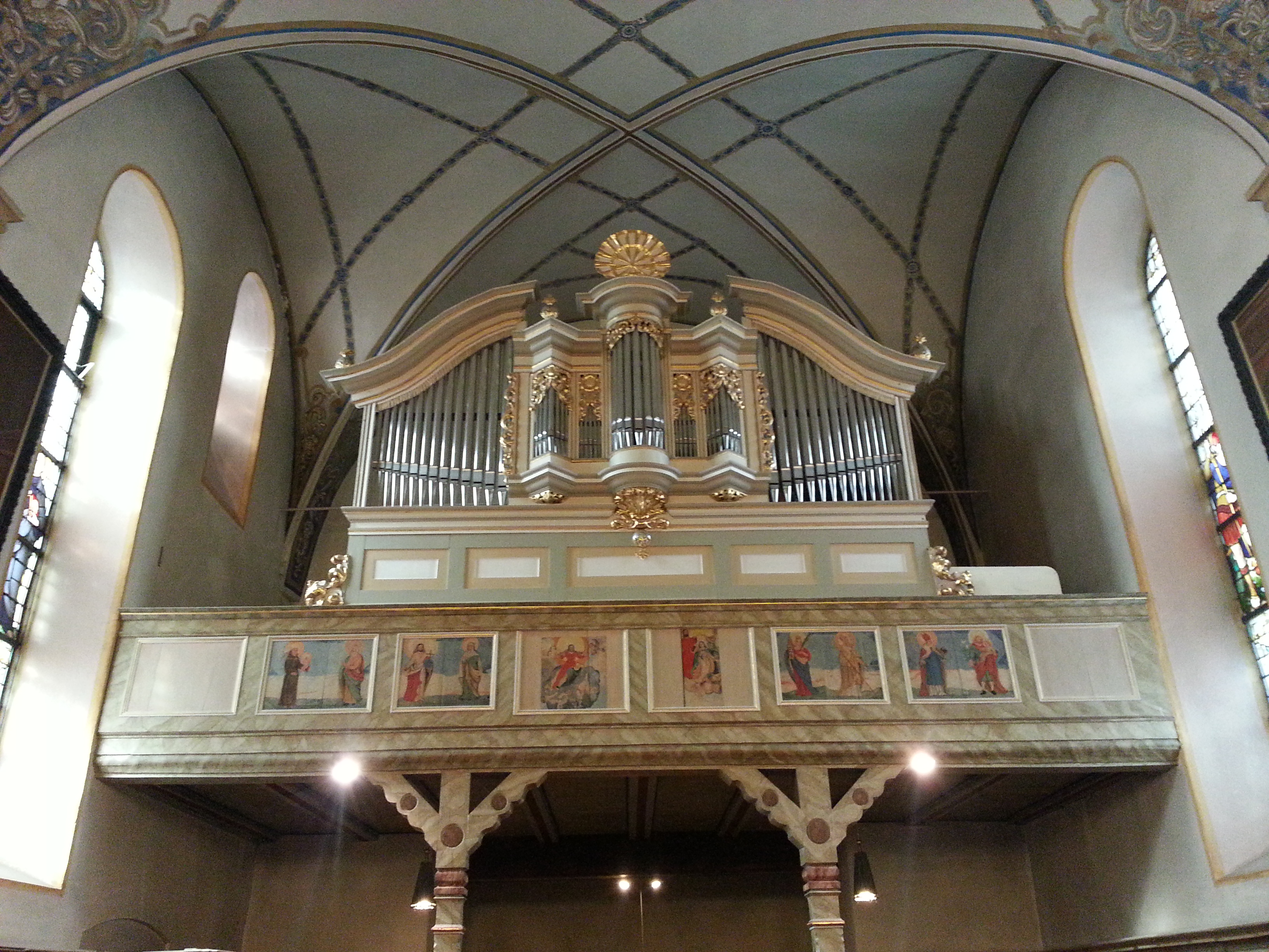 Die Krell-Orgel in Obernfeld hinter dem historischen Orgelprospekt von Johannes Creutzburg aus dem 1723